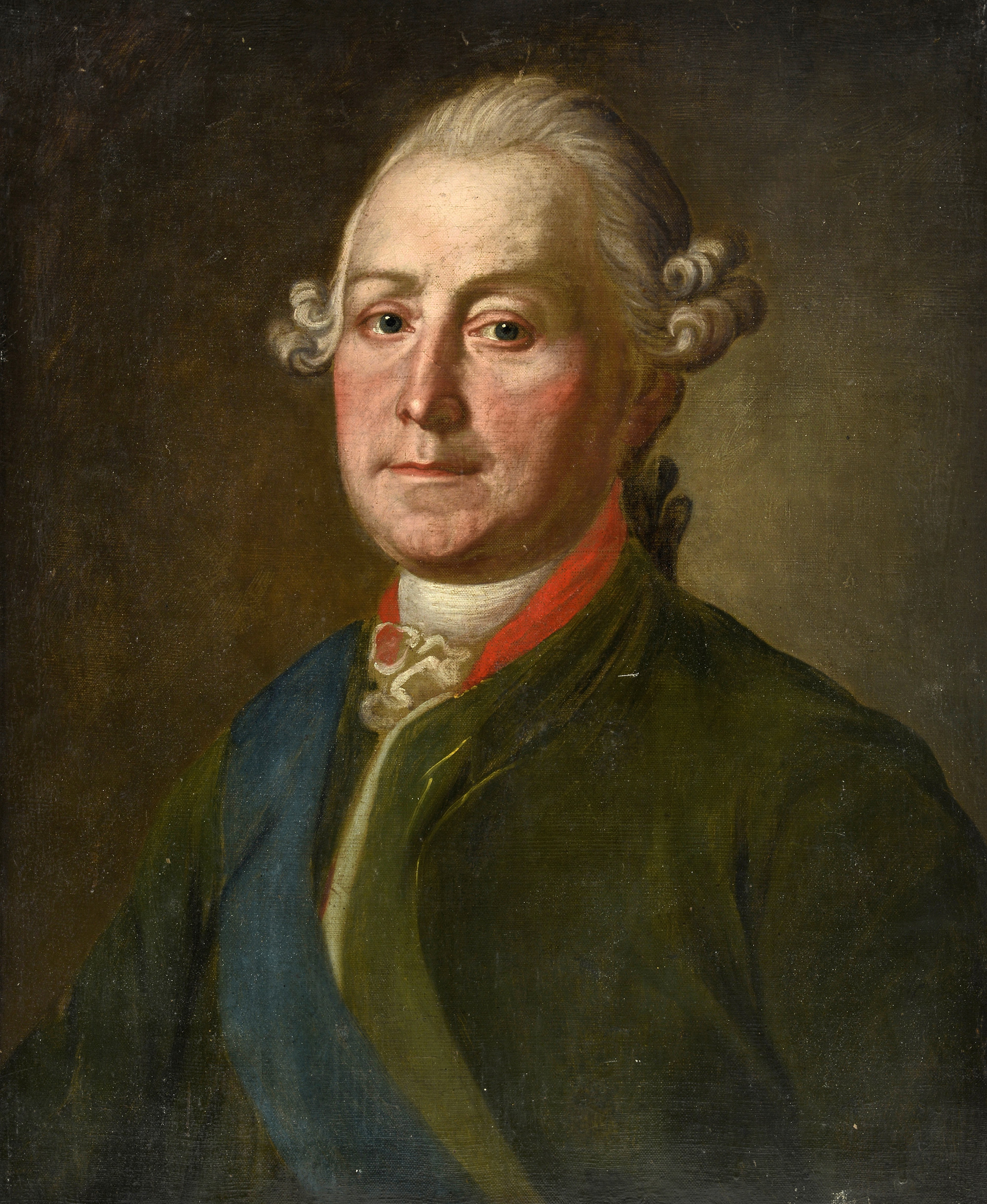 Portrait de Lev Alexandrovitch Narychkine (1733-1799), huile sur toile, non signé, 55x45 cm Provenance: Cyrille et Vera Narychkine, situé dans la chambre destinée au petit-déjeuner, Villa Narychkine à Biarritz